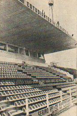 Vista de la platea techada del estadio Jorge Luis Hirschi, demolido en 2007 y propiedad de Estudiantes de La Plata.